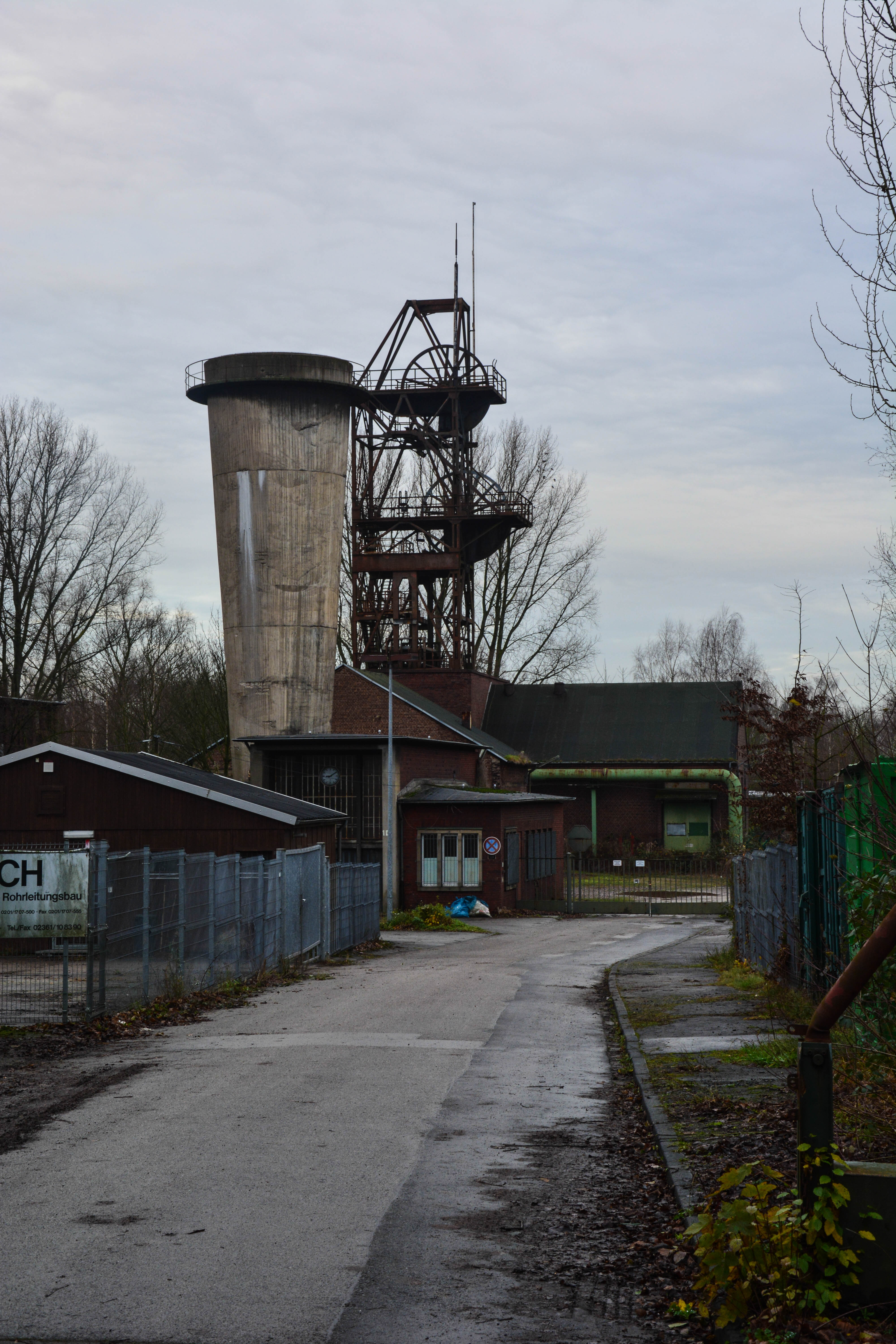 Recklinghausen Nebenschachtanlage